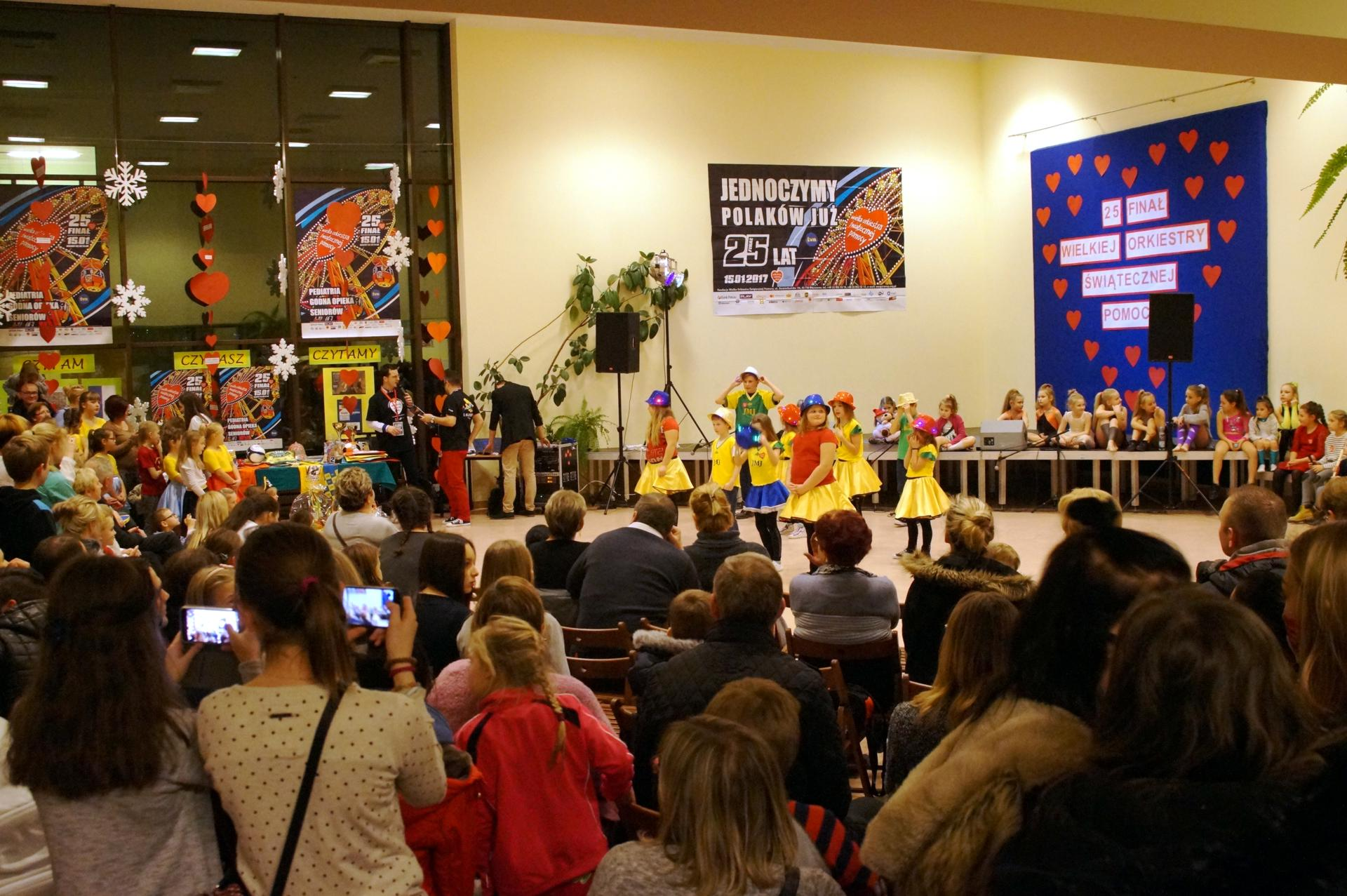 Gminny finał Wielkiej Orkiestry Świątecznej Pomocy 2017